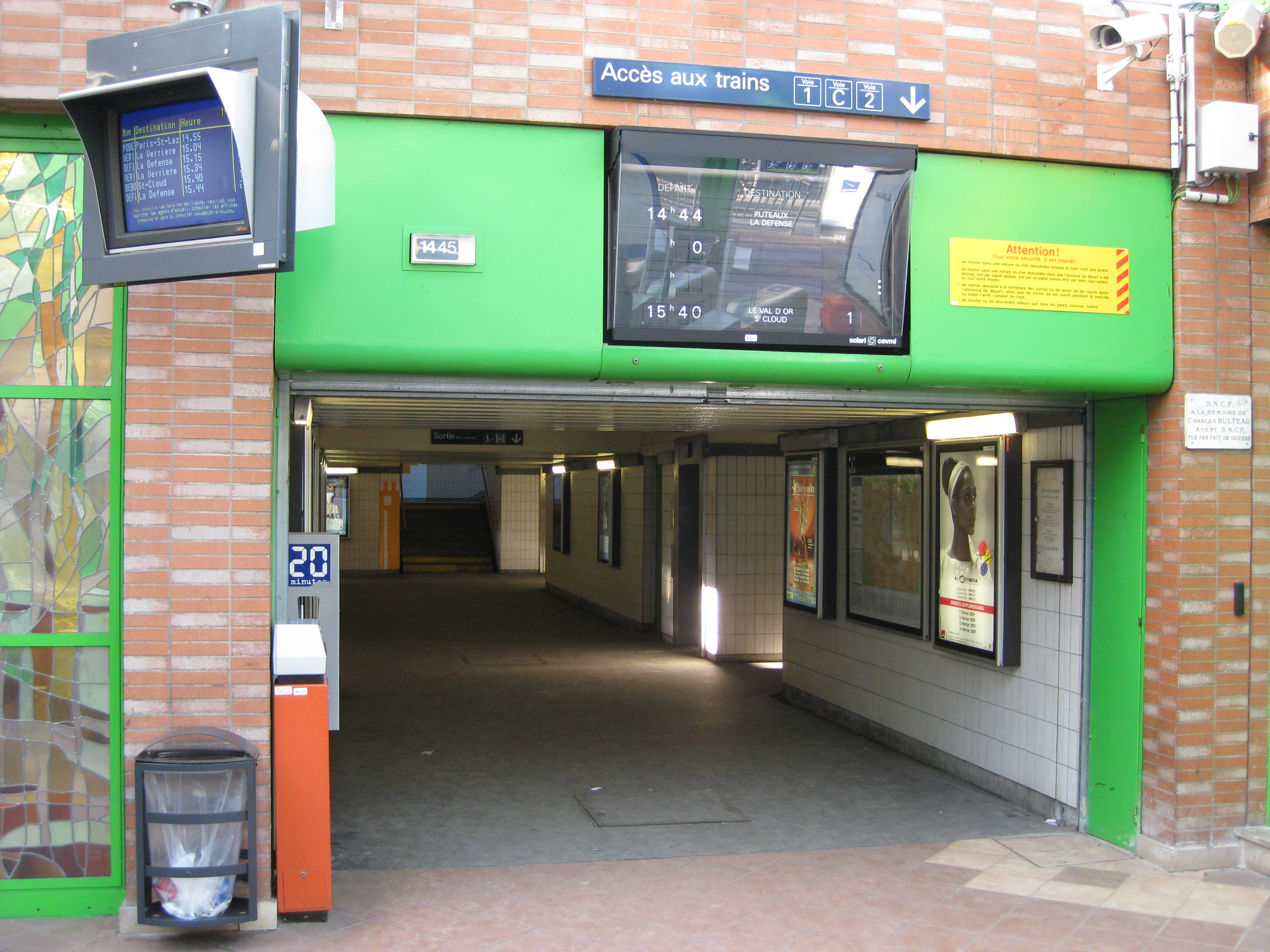 Gare de Suresnes Mont Valérien : accès souterrain sud